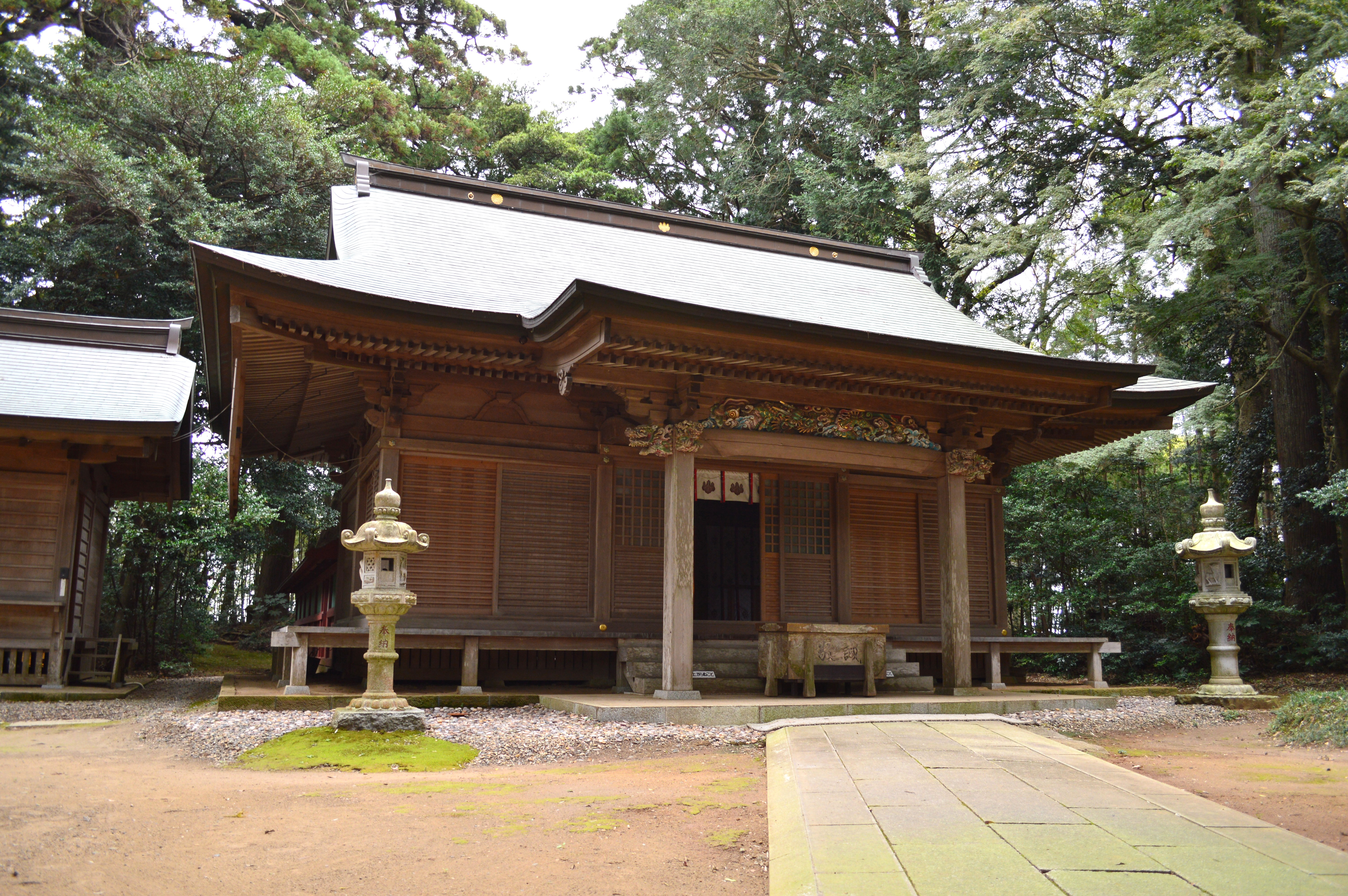 側高神社 (香取市大倉) 拝殿